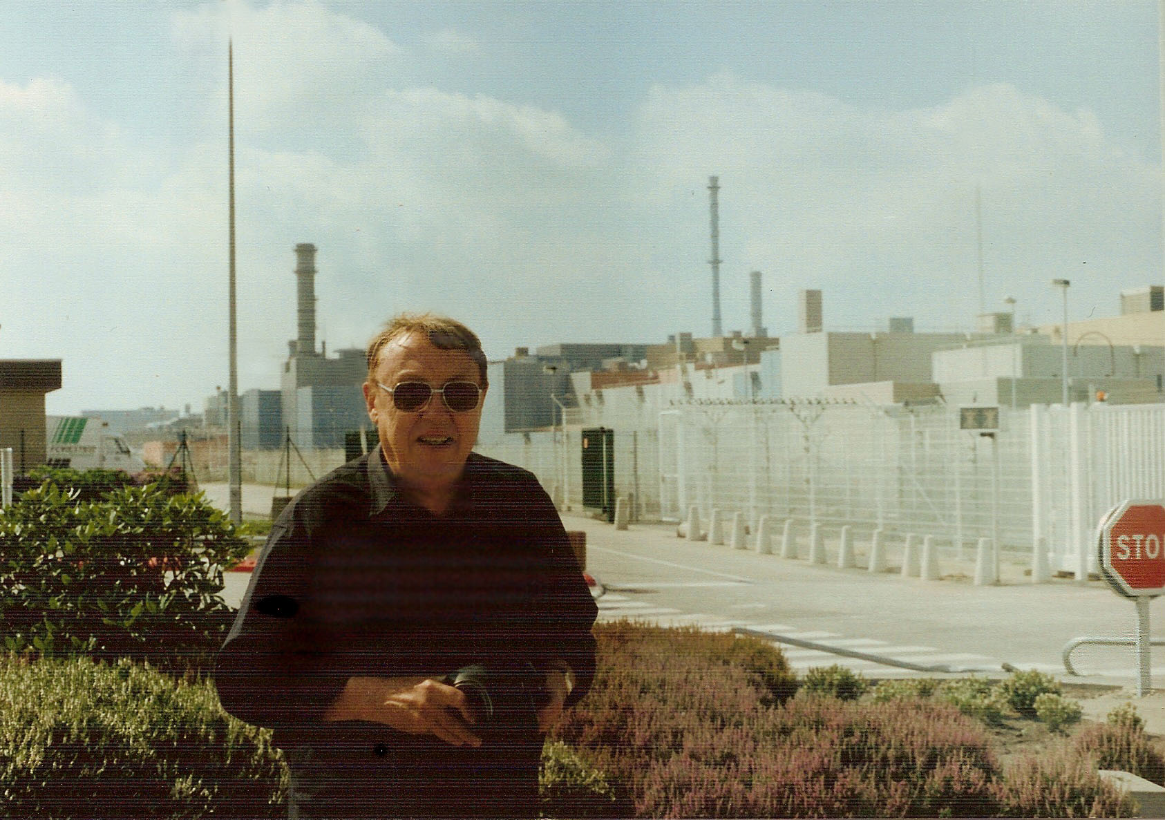 Michel Dorigné (poète, dramaturge et musicologue) devant l'usine de traitement des déchets nucléaires.